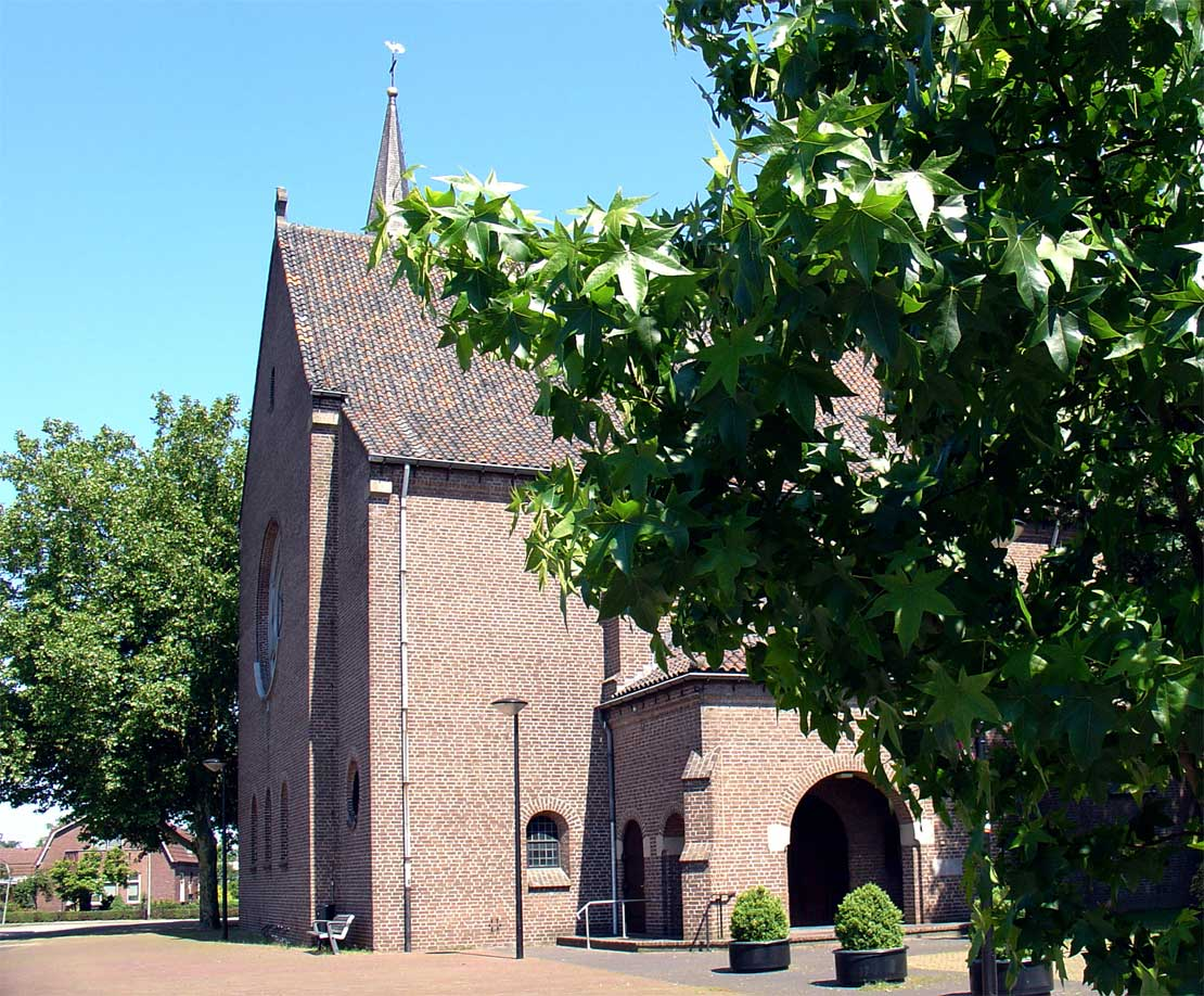 Sint Michaëlskerk te Wanssum (Church Wanssum)